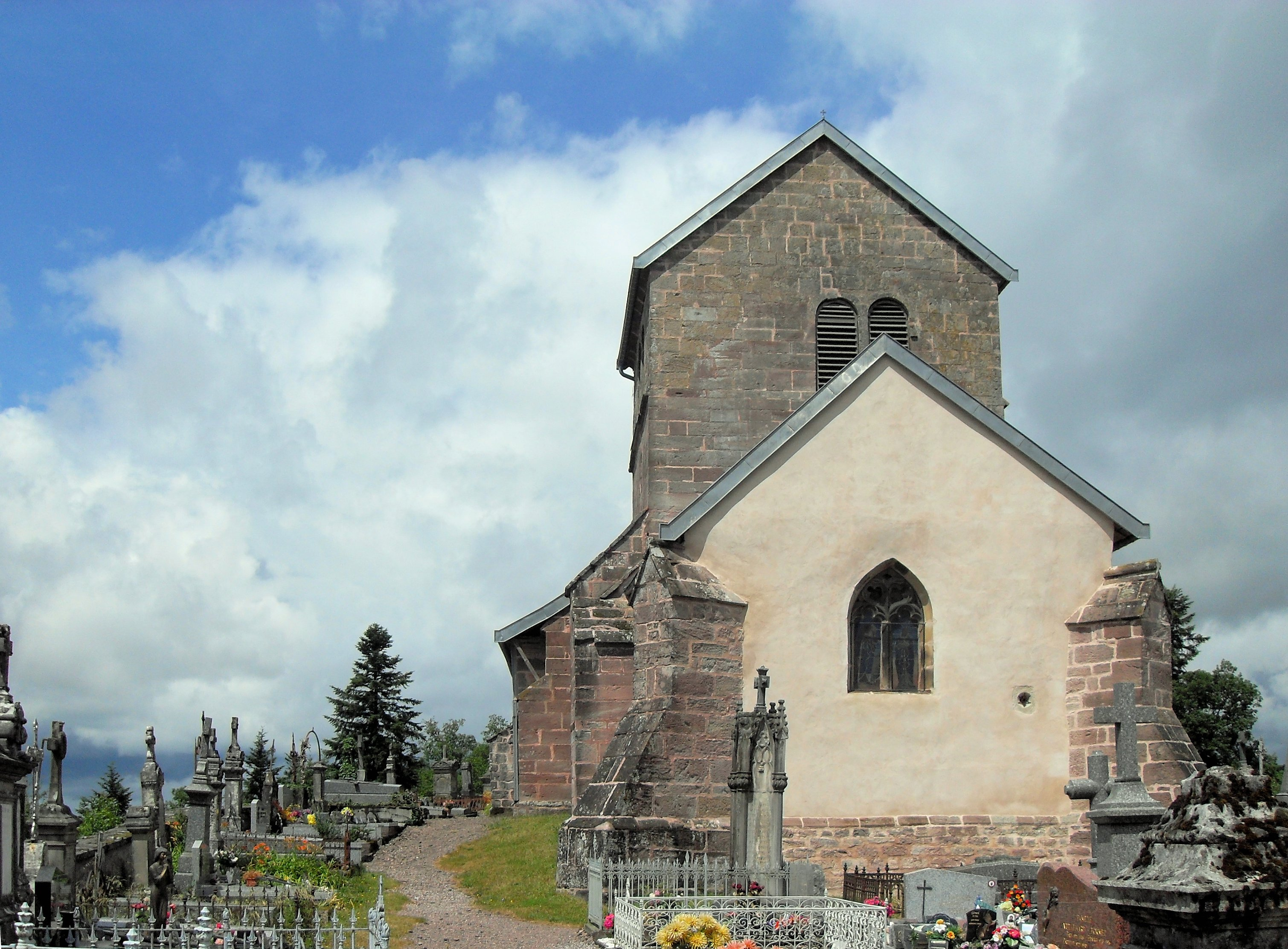 La chapelle Saint-Martin et le cimetière de la Montagne Saint-Martin à Faucogney-et-la-Mer